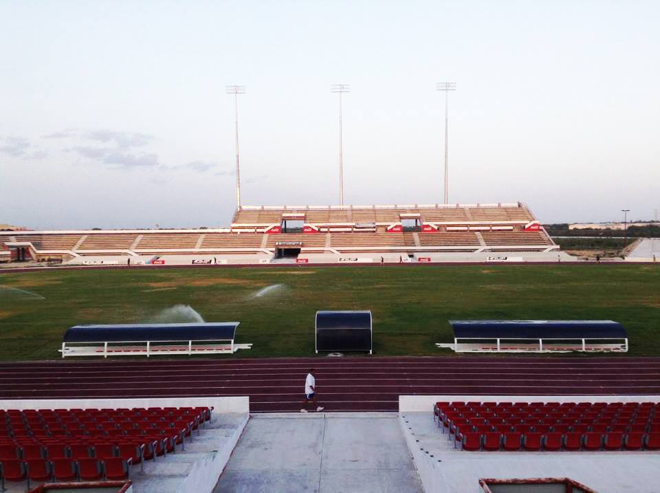 Estadio